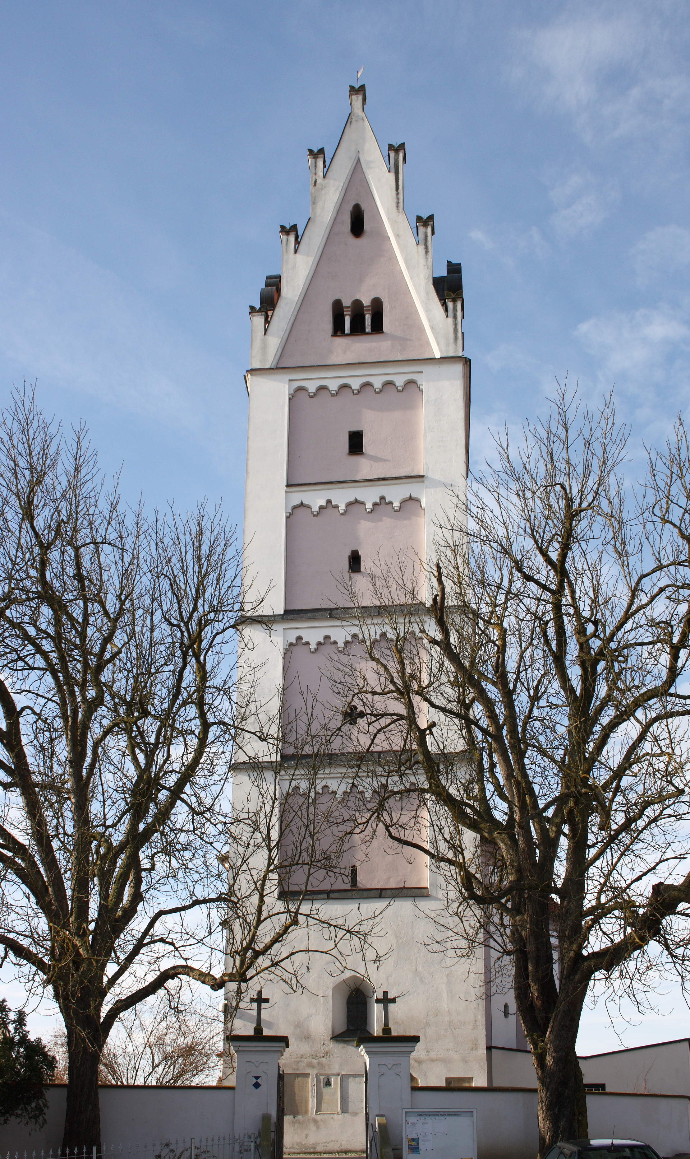 Katholische Pfarrkirche Mariä Himmelfahrt in Scheppach, einem Ortsteil von Jettingen-Scheppach im Landkreis Günzburg (Bayern), ehemalige Chorturmkirche, 1768 Neubau durch Joseph Dossenberger, ehemaliger Chorturm